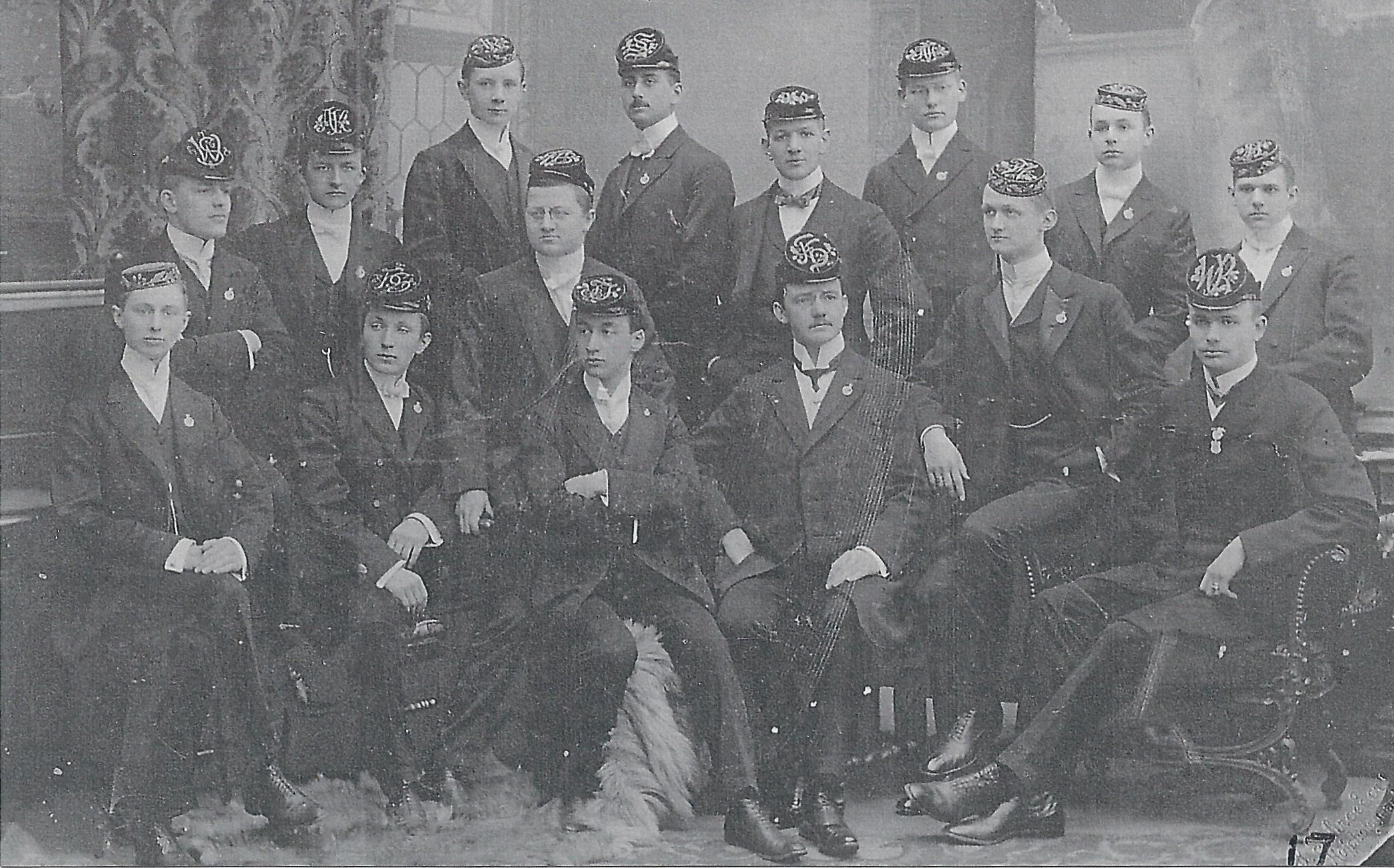 Abiturienten eines Gymnasiums in Königsberg i. Pr..